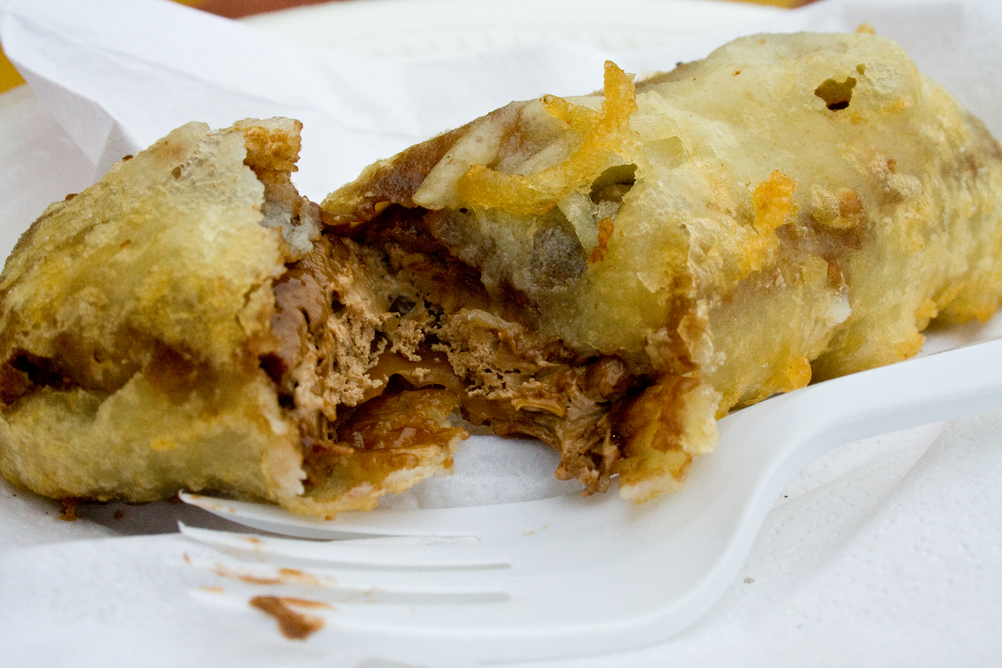 Take one mars bar, cover it in batter, deep Fry, eat, regret